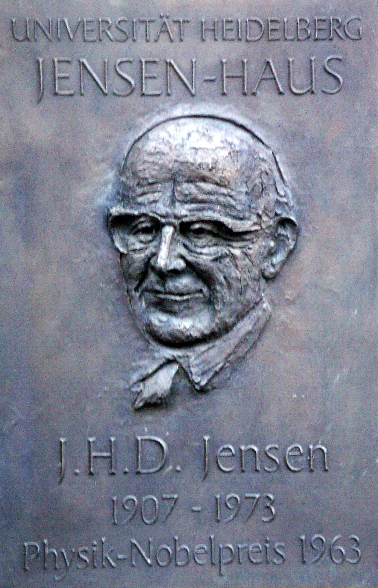 Gedenkplakette am Jensen-Haus der Universität Heidelberg J. H. D. Jensen (1907-1973) Physik-Nobelpreis 1963